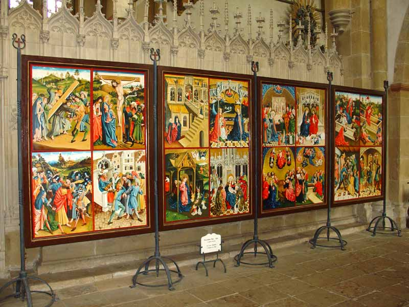 Kopie des Marienfelder Altars von 1457 im Chorumgang der ehemaligen Abteikirche Marienfeld